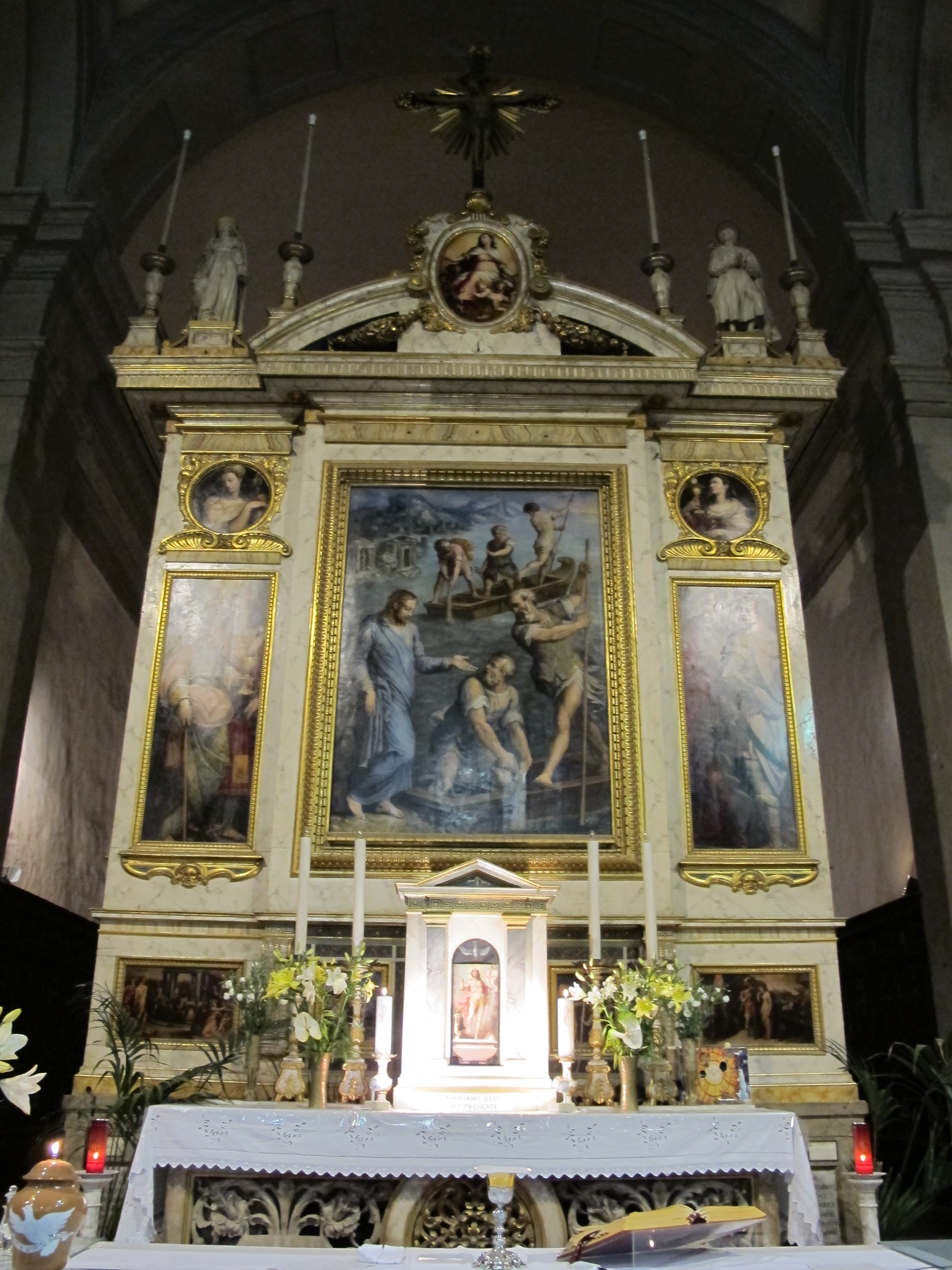 Badia di arezzo, altare di vasari Badia di arezzo, altare di vasari